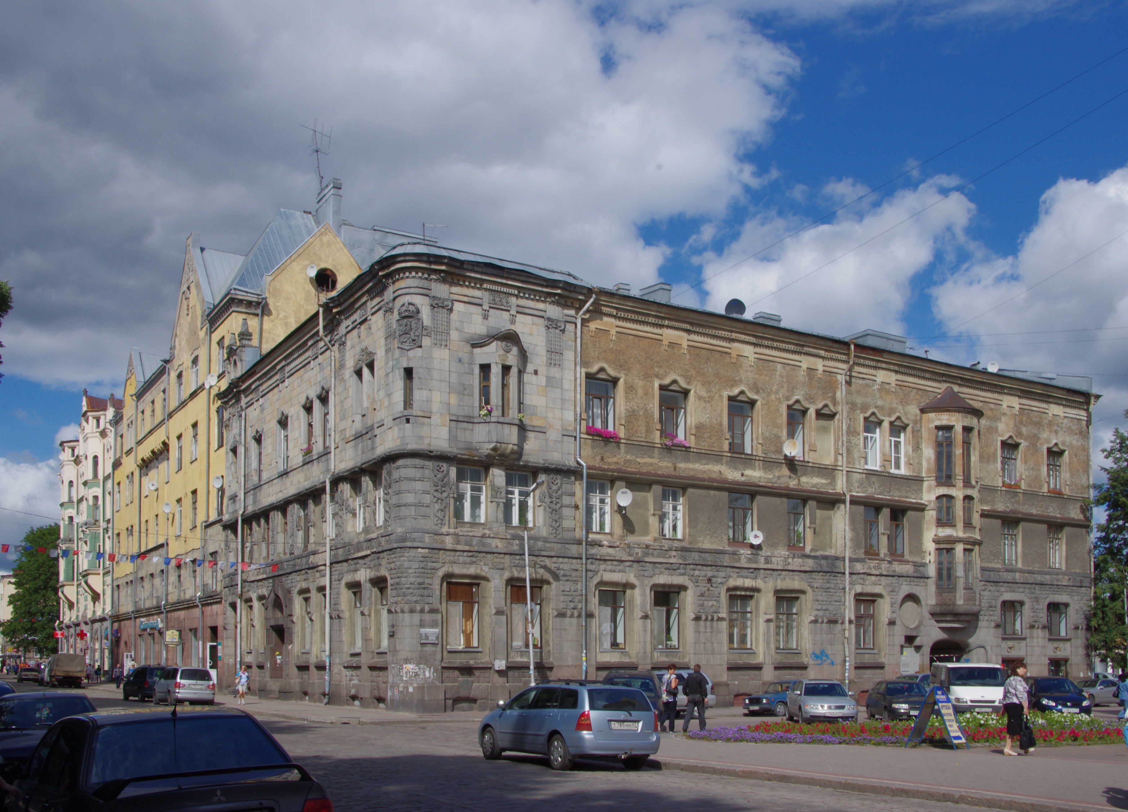 Vyborg, Leningrad Oblast, Russia